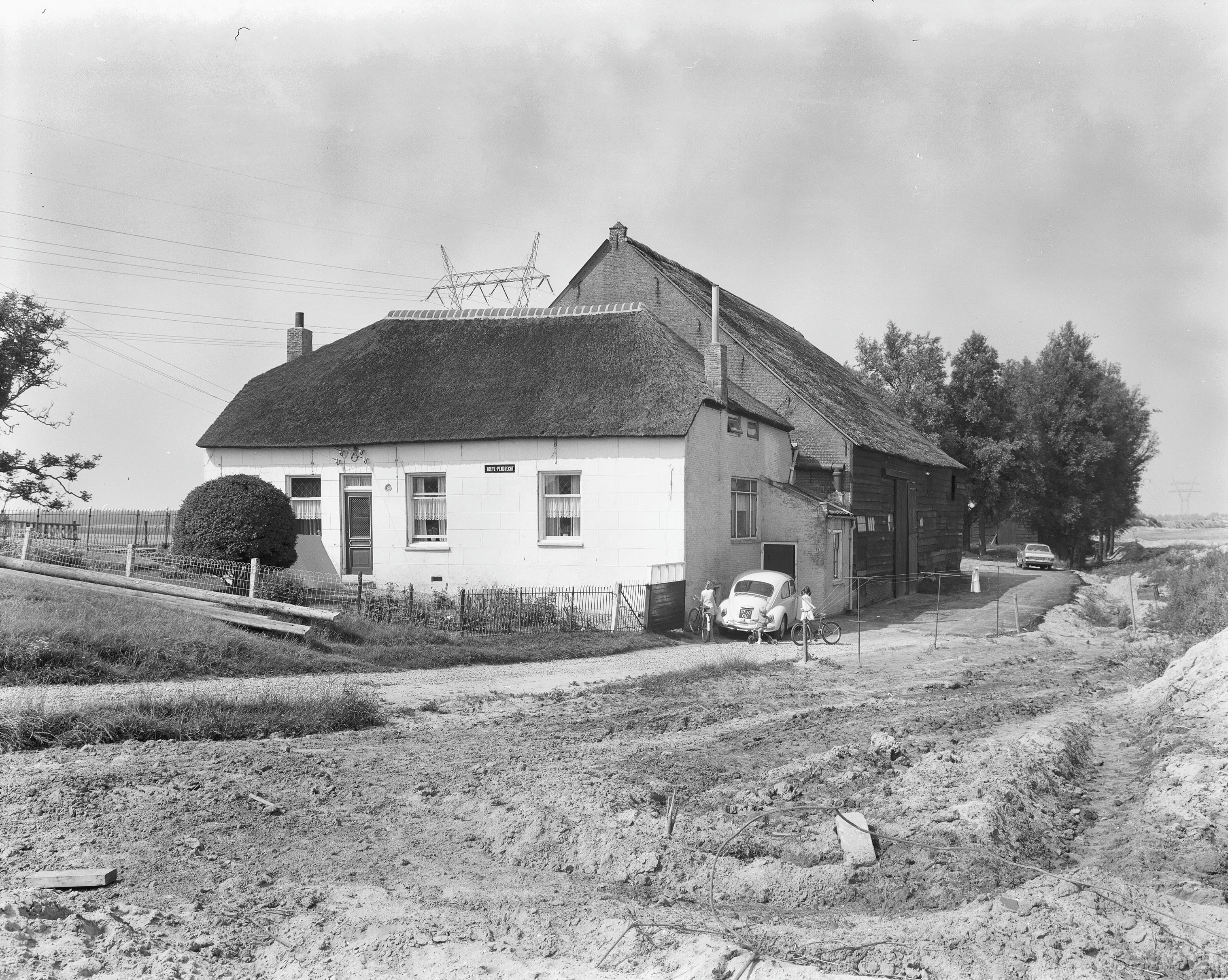 Hoeve Pendrechtse: Hoeve "Pendrecht", voorzijde